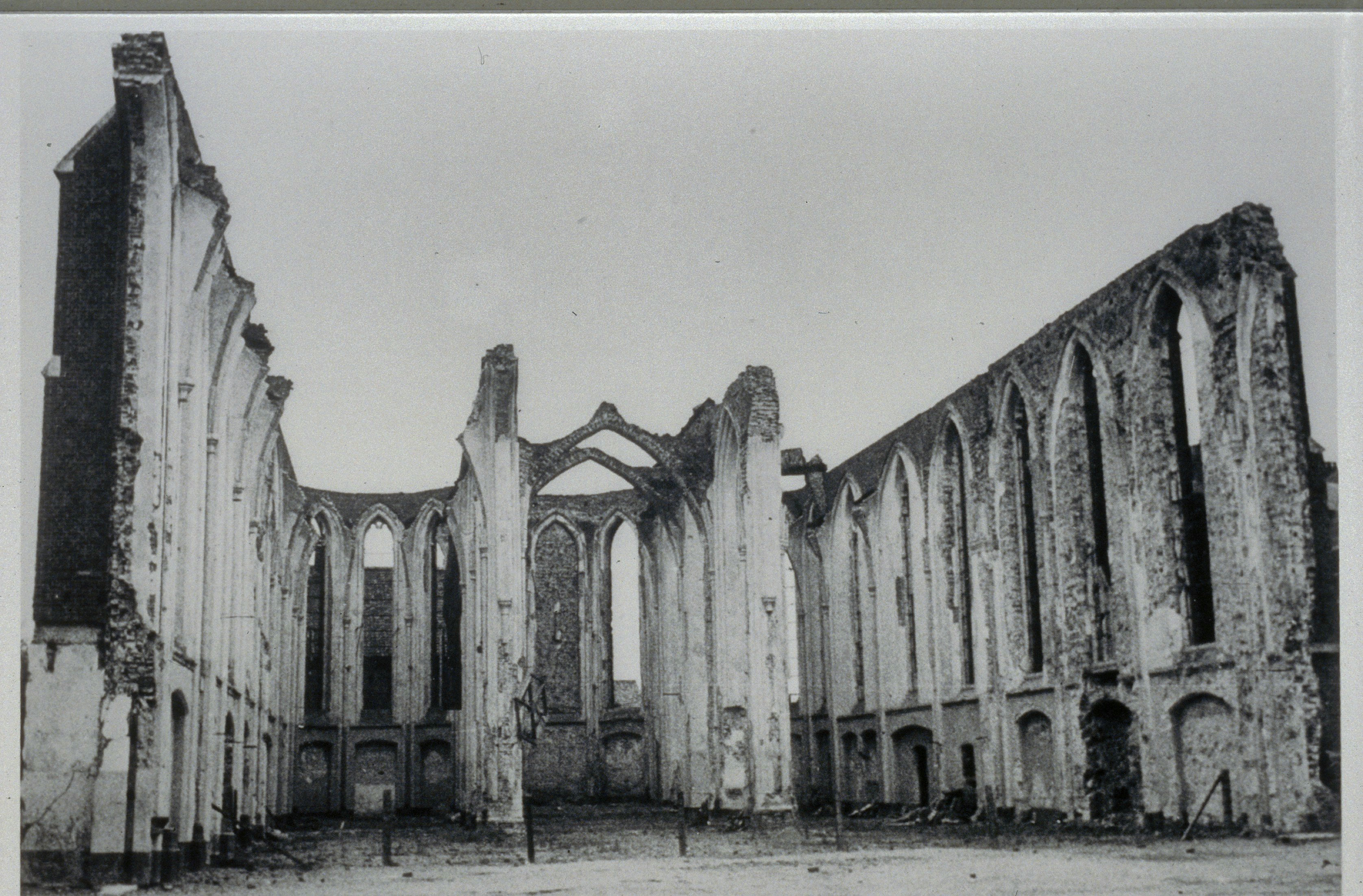 Sint Lambertuskerk: Interieur van de verwoeste kerk